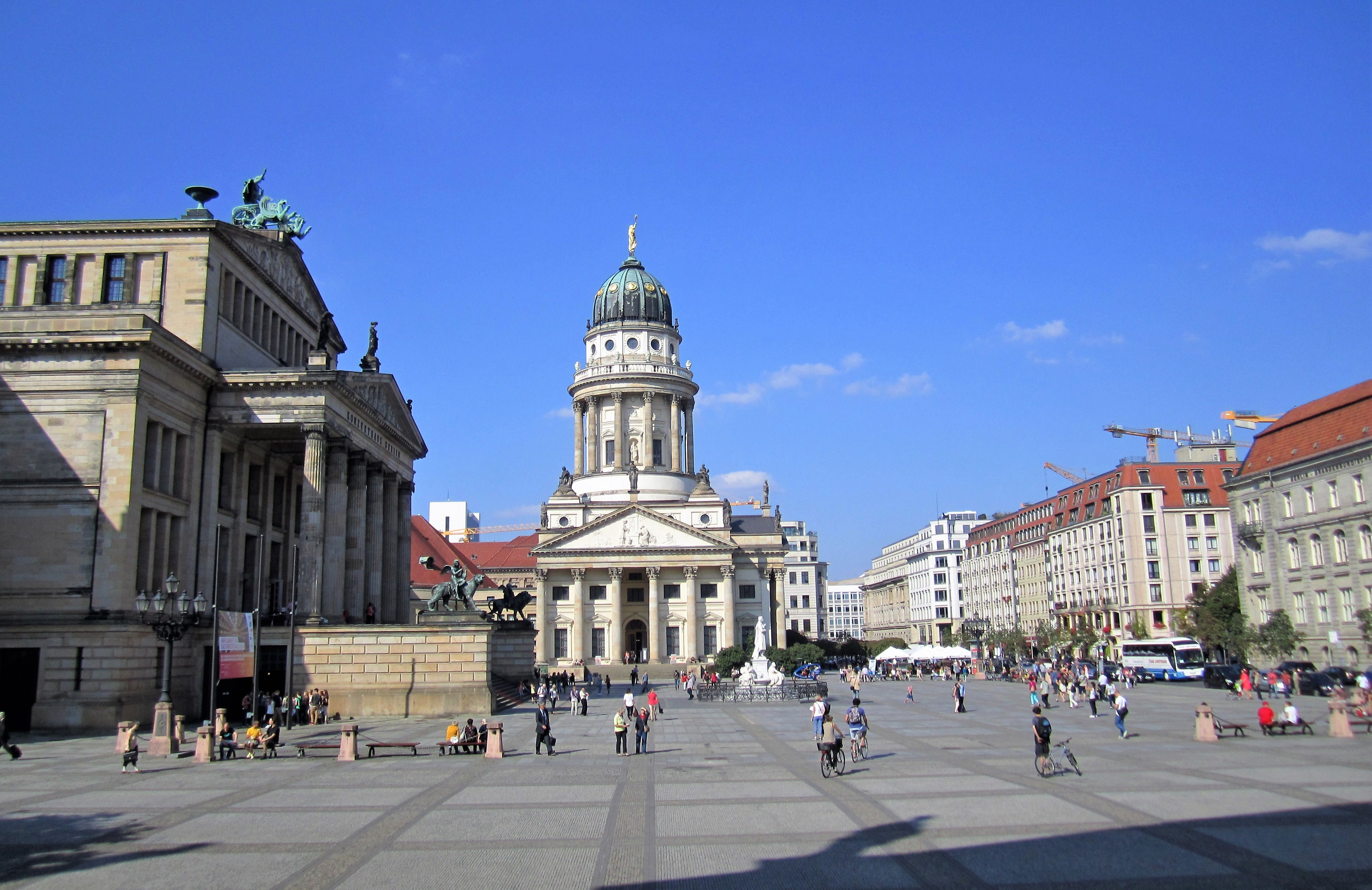 Gendarmenmarkt in Berlin, mit dem Konzerthaus (links) und dem Französischen Dom.